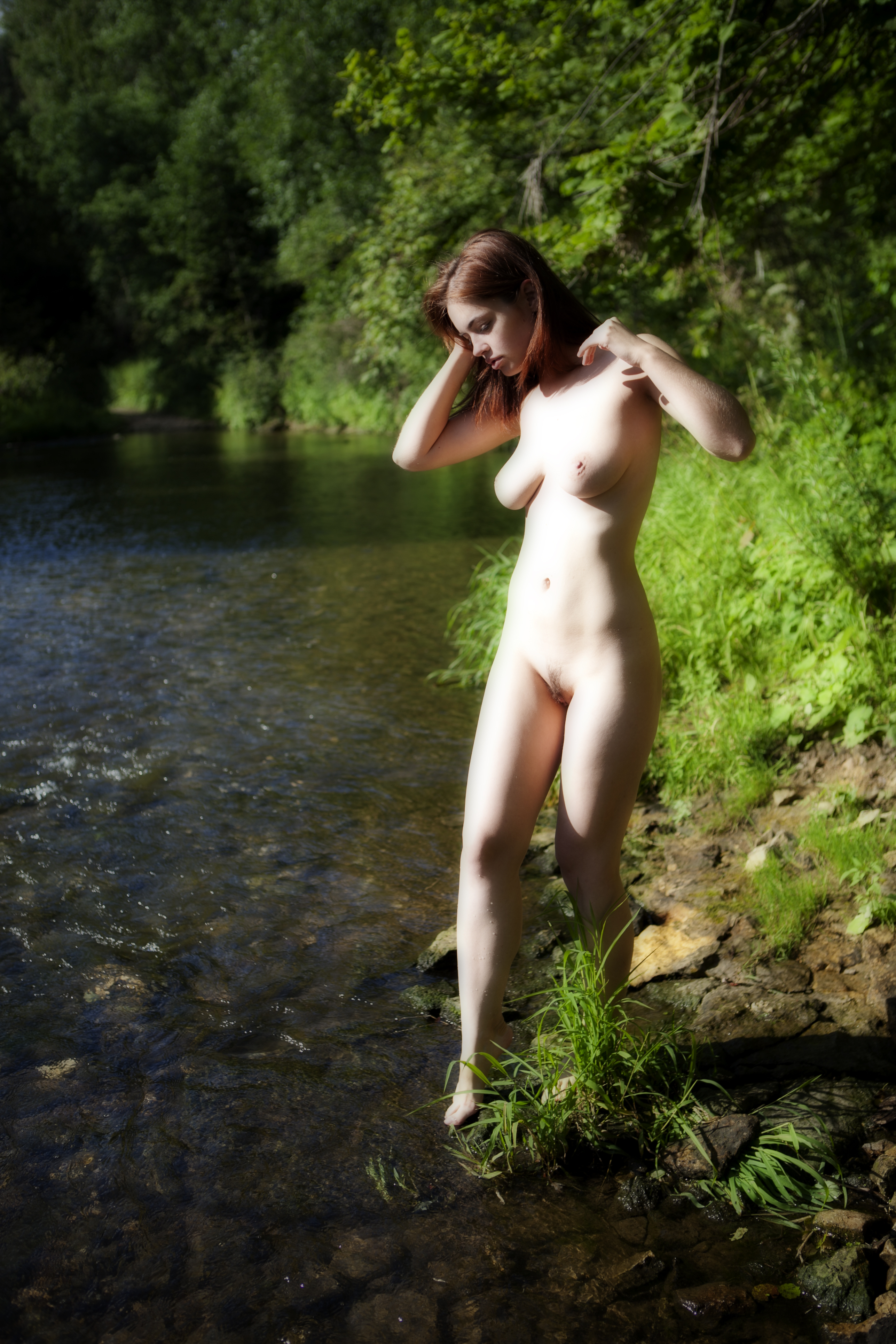 The Russian model Lidia Savoderova